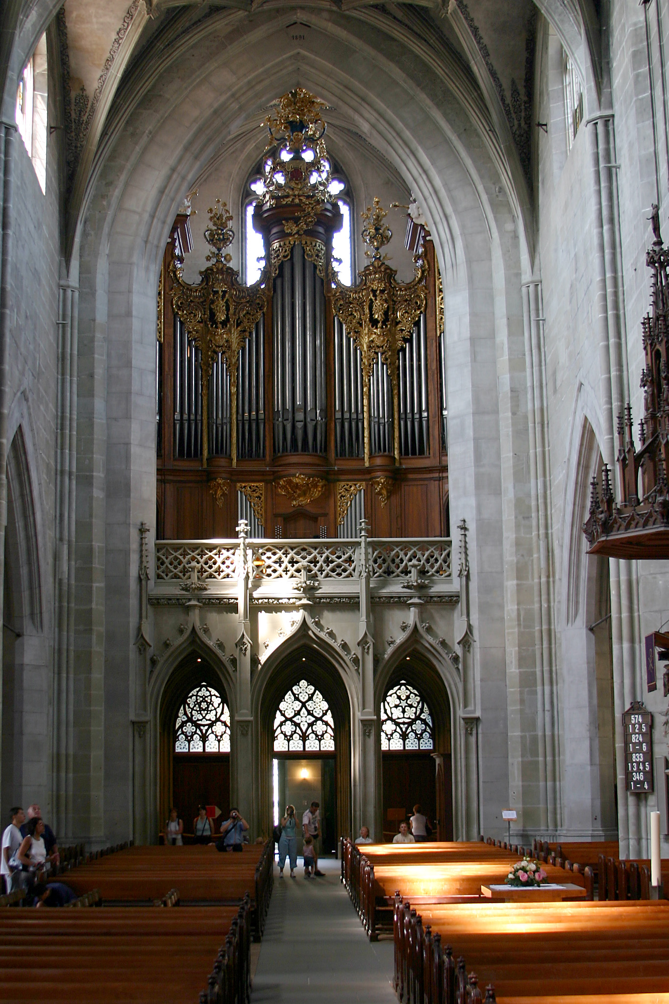 Münster, Bern, Schweiz